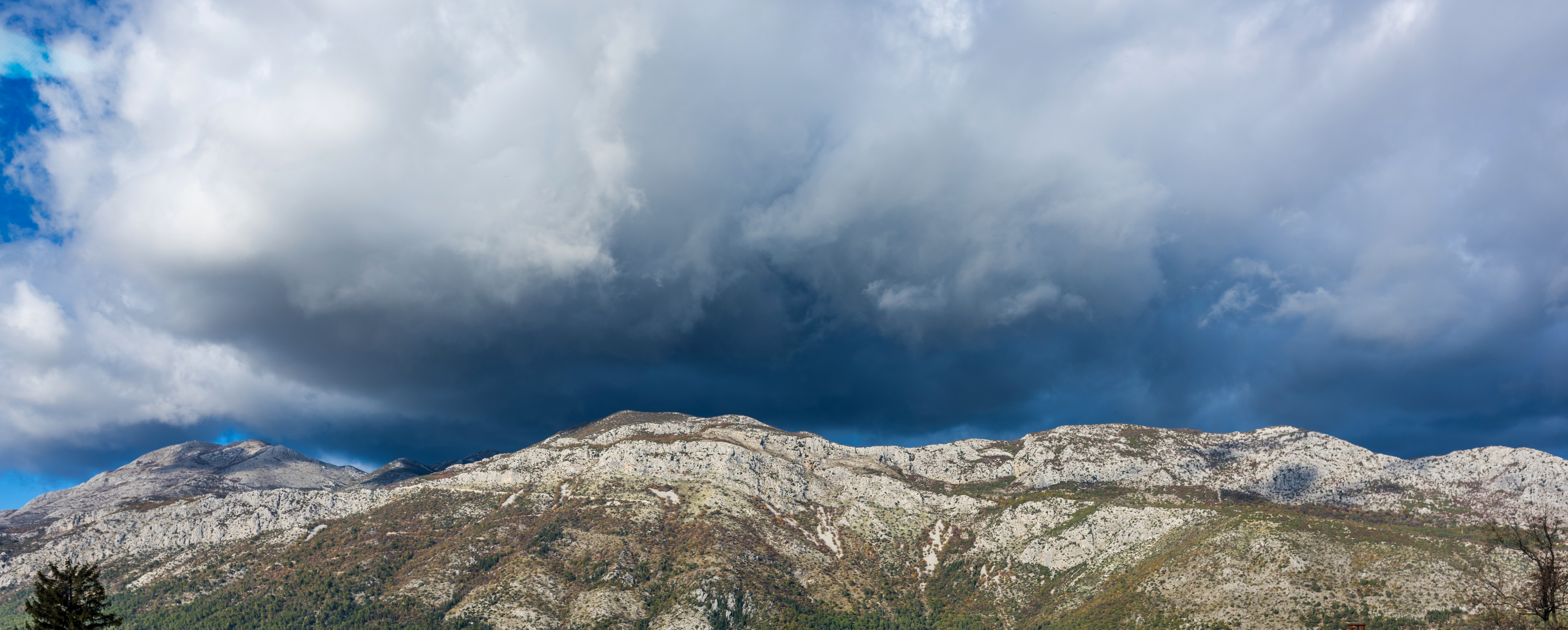 Dubrovnik Croatia November 2017